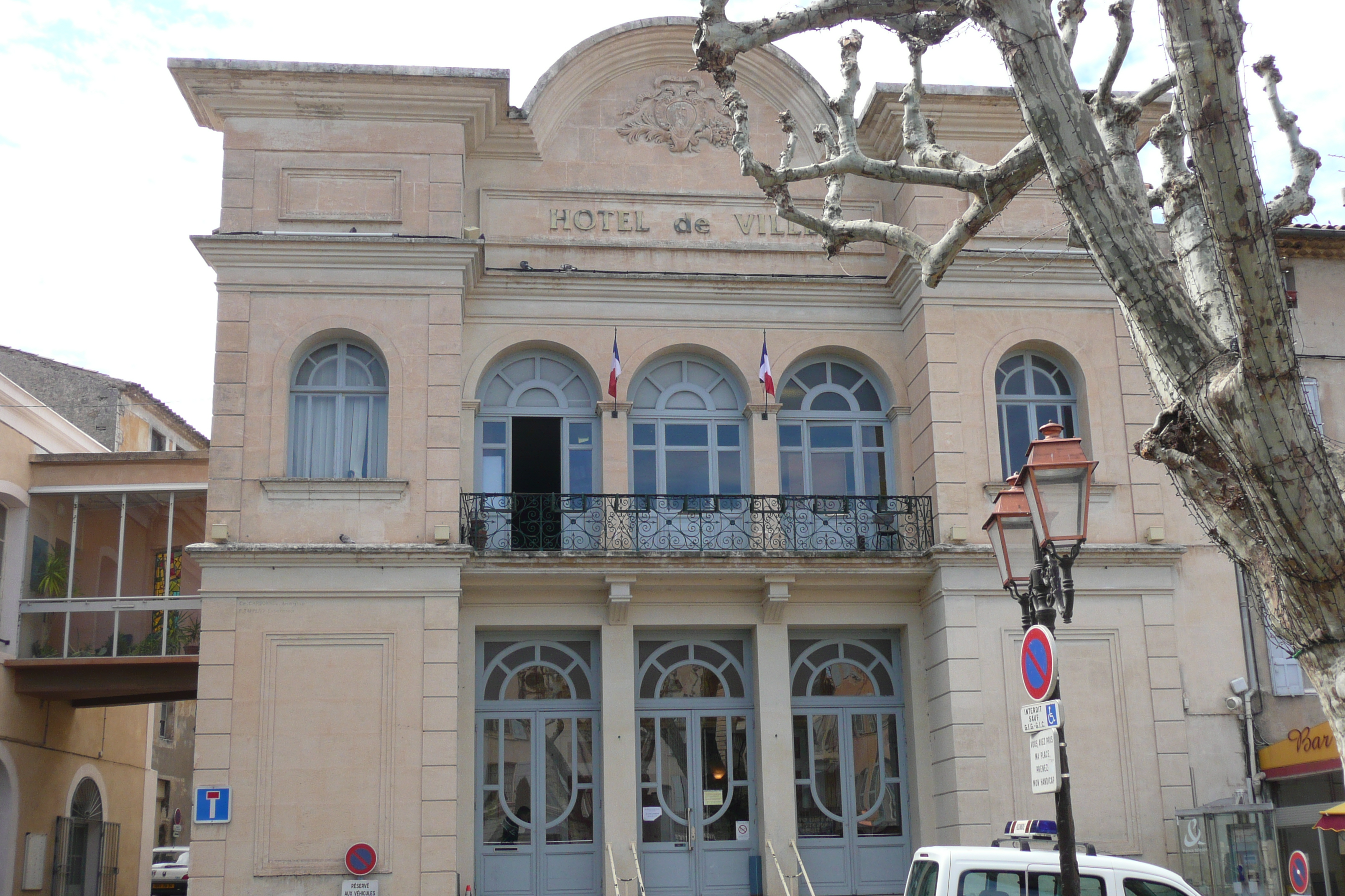 Hôtel de ville à Apt.